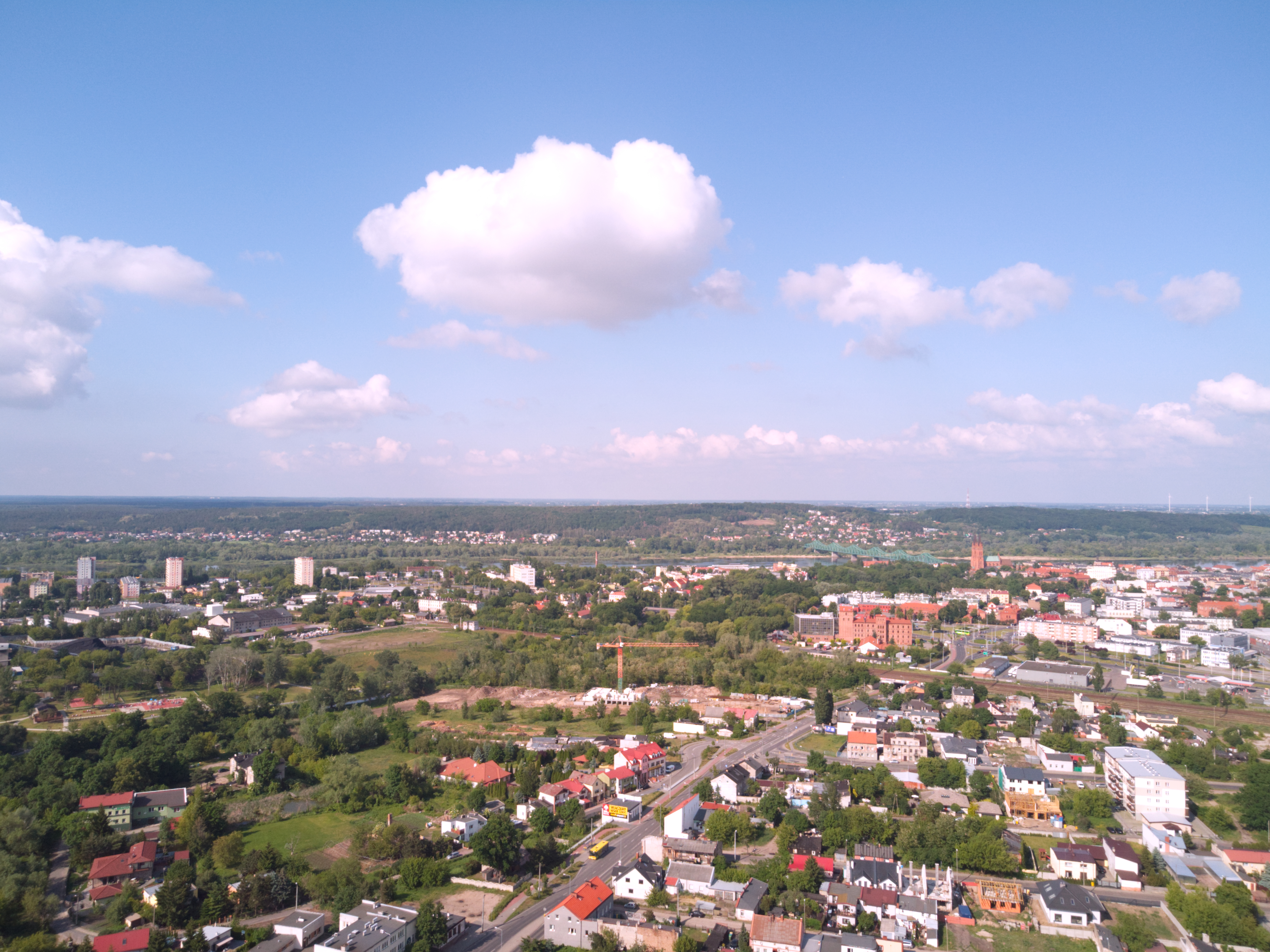 Styk Zazamcza, Południa i Śródmieścia